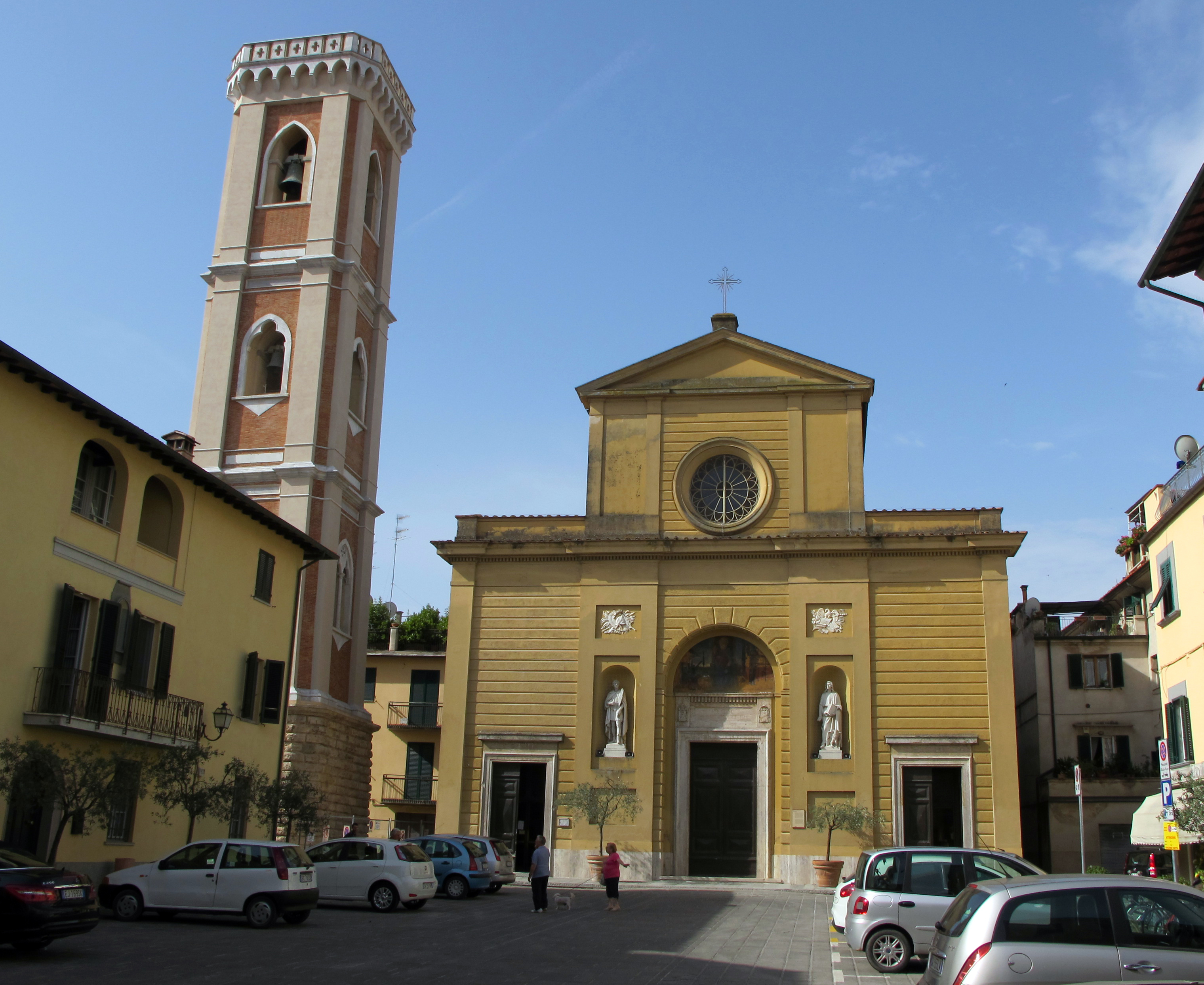 Ponsacco